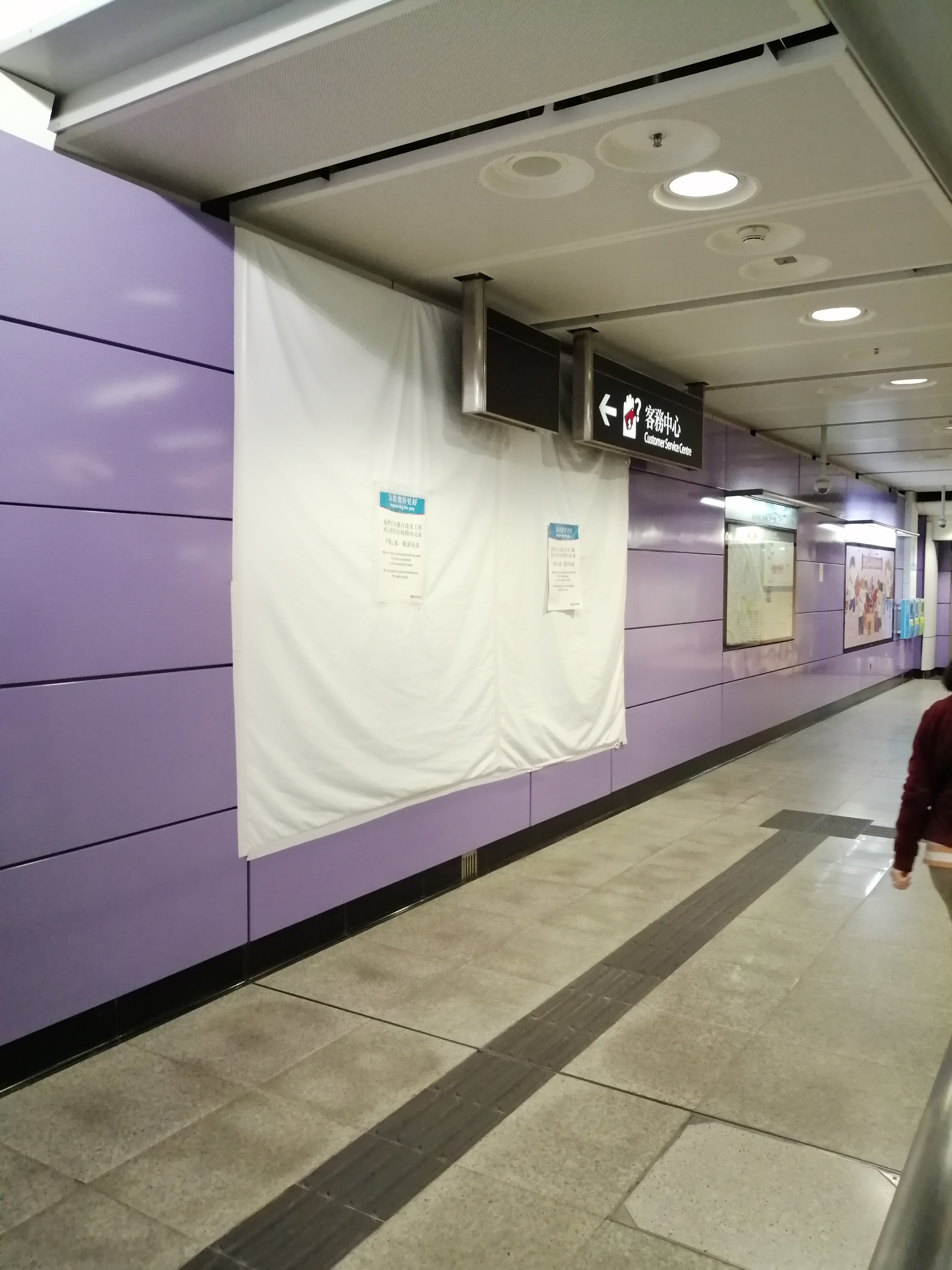 中文（香港）: 西營盤站遭到破壞的廣告板